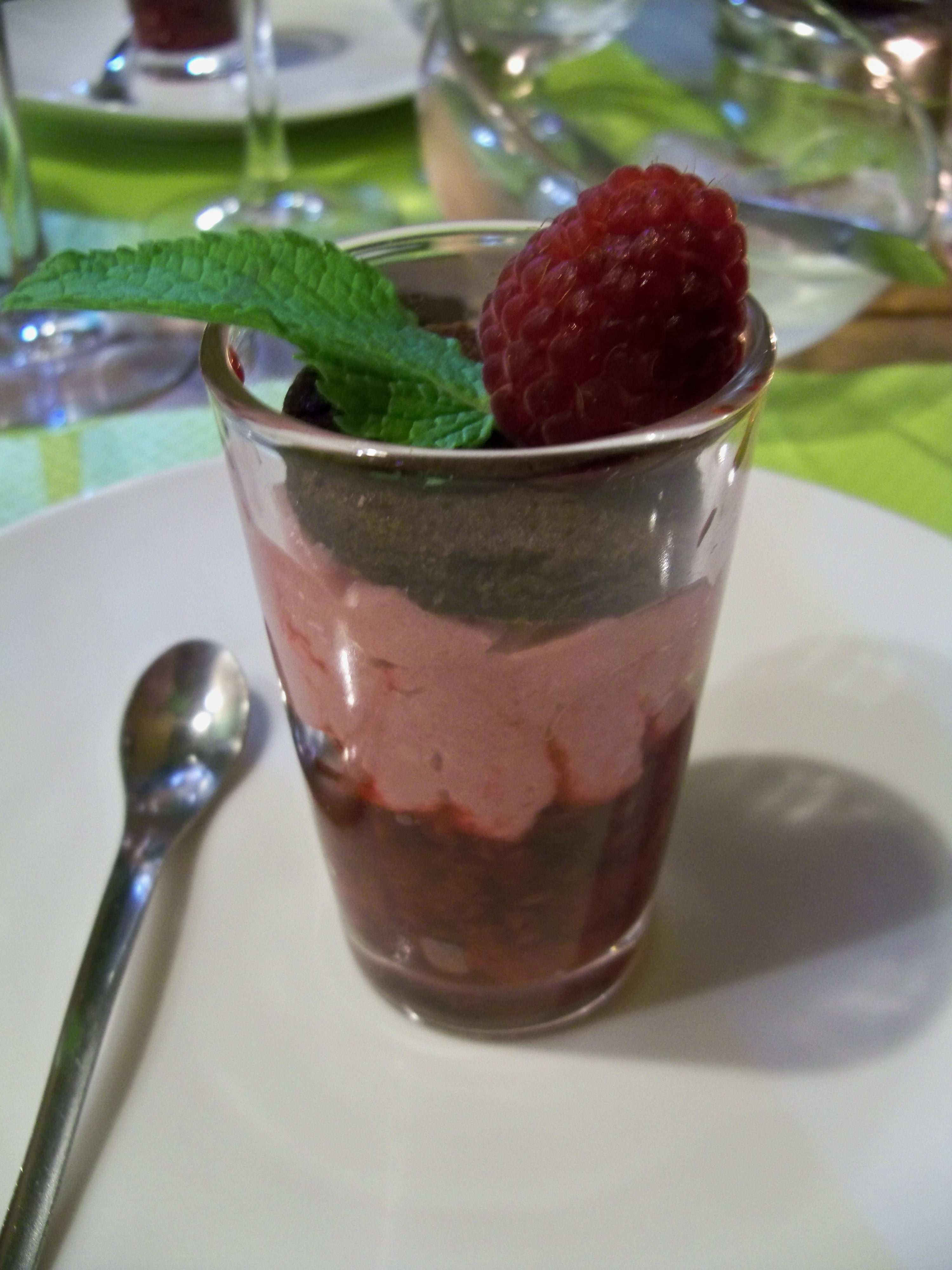 Verrine de mousse framboise